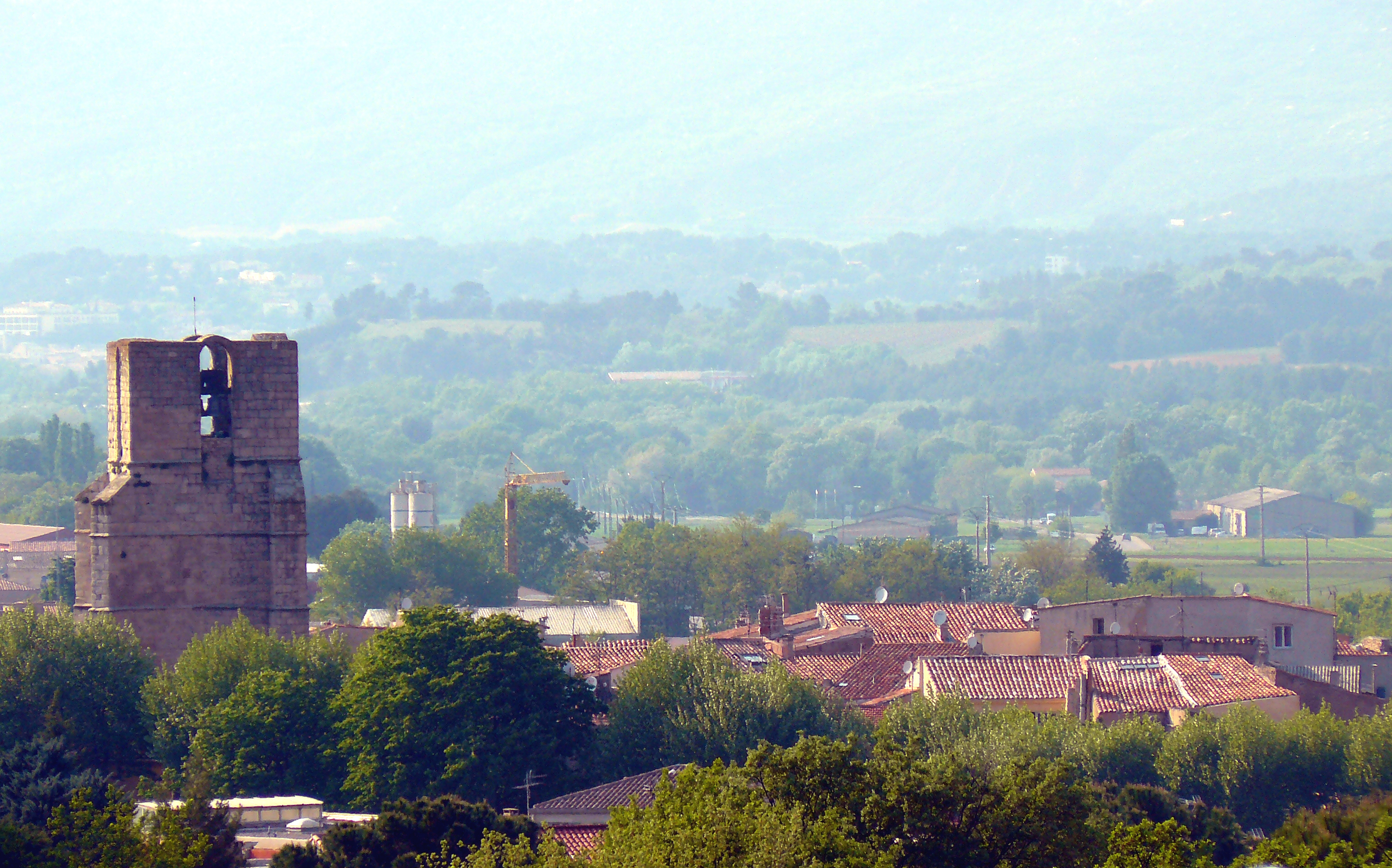 Vue du clocher de Notre Dame de Nazareth et du village depuis le chemin du Félibre